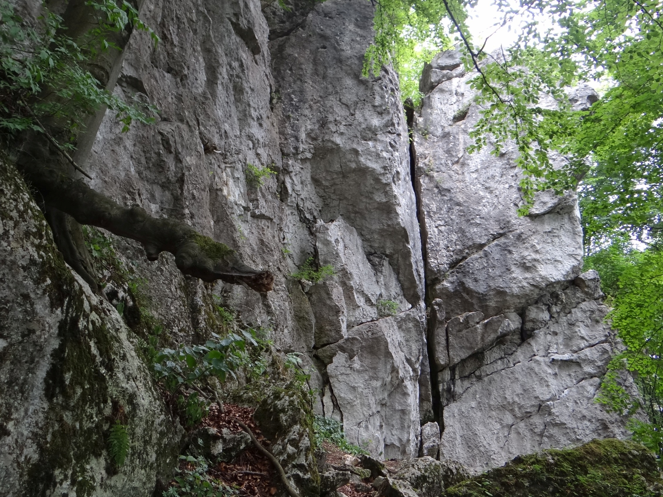 Skała Gips V na wzgórzu Łężec między Morskiem i Podlesicami